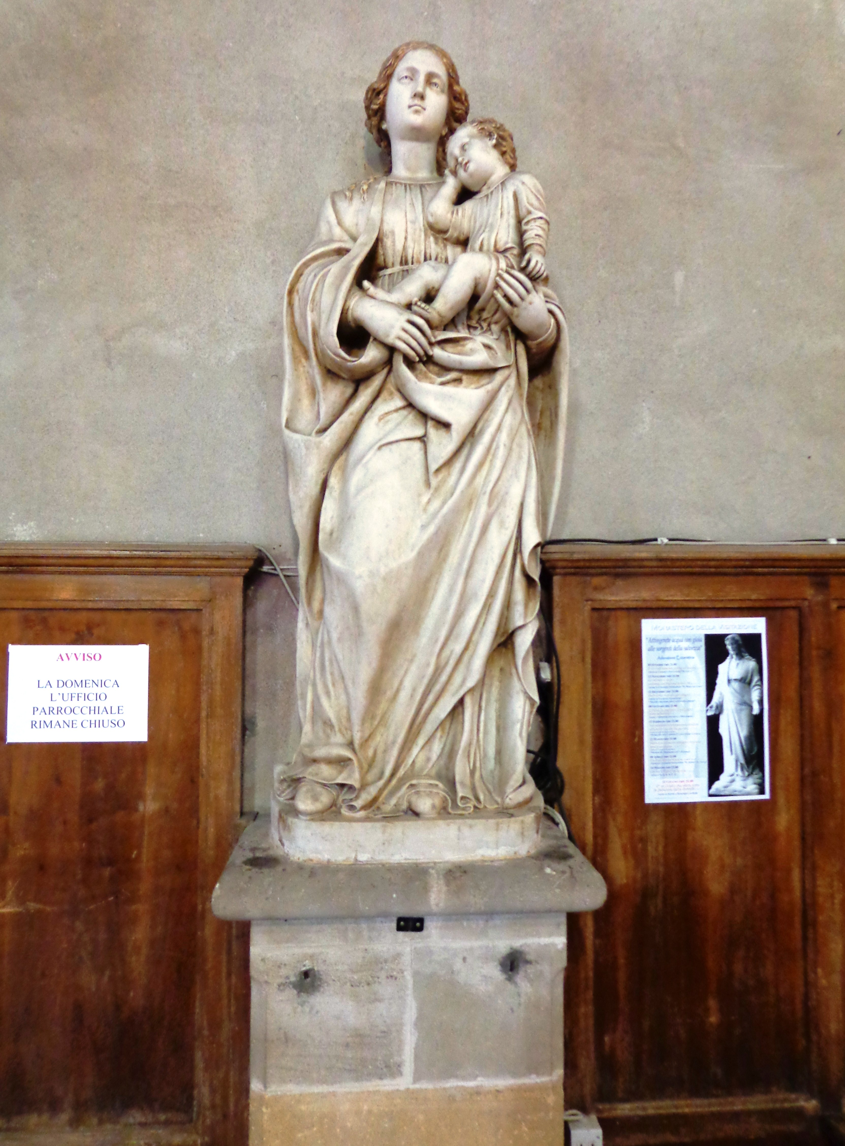 Chiesa_Cancelliere_01